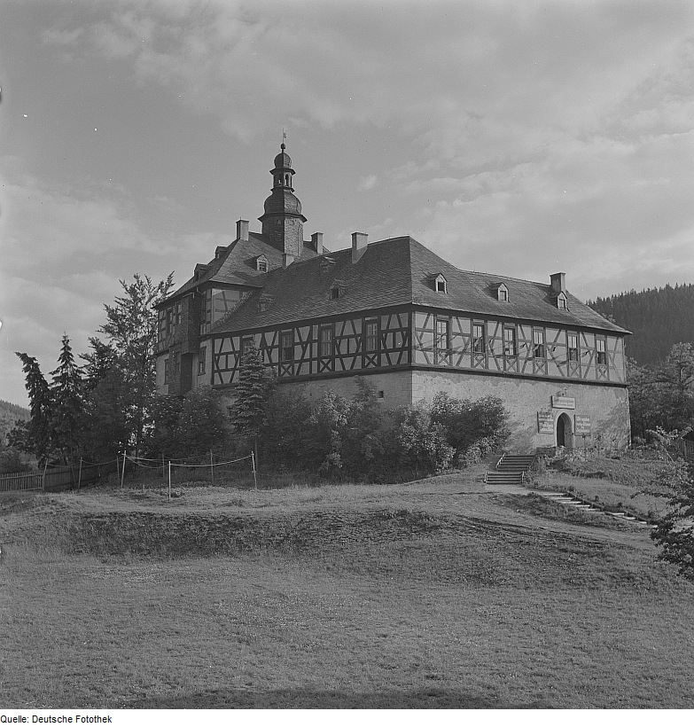 Original image description from the Deutsche Fotothek Schloss Eichicht